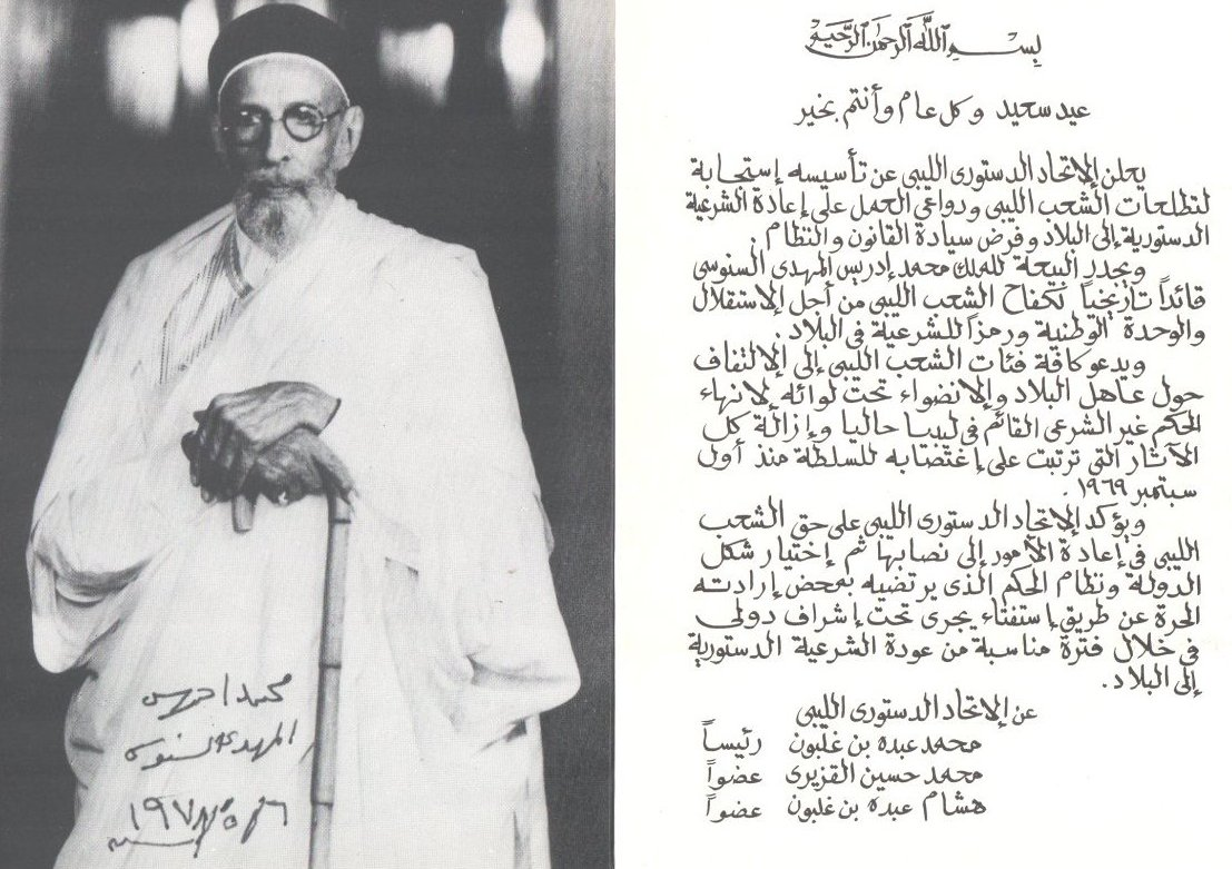 البيان التأسيسي للاتحاد الدستوري الليبي